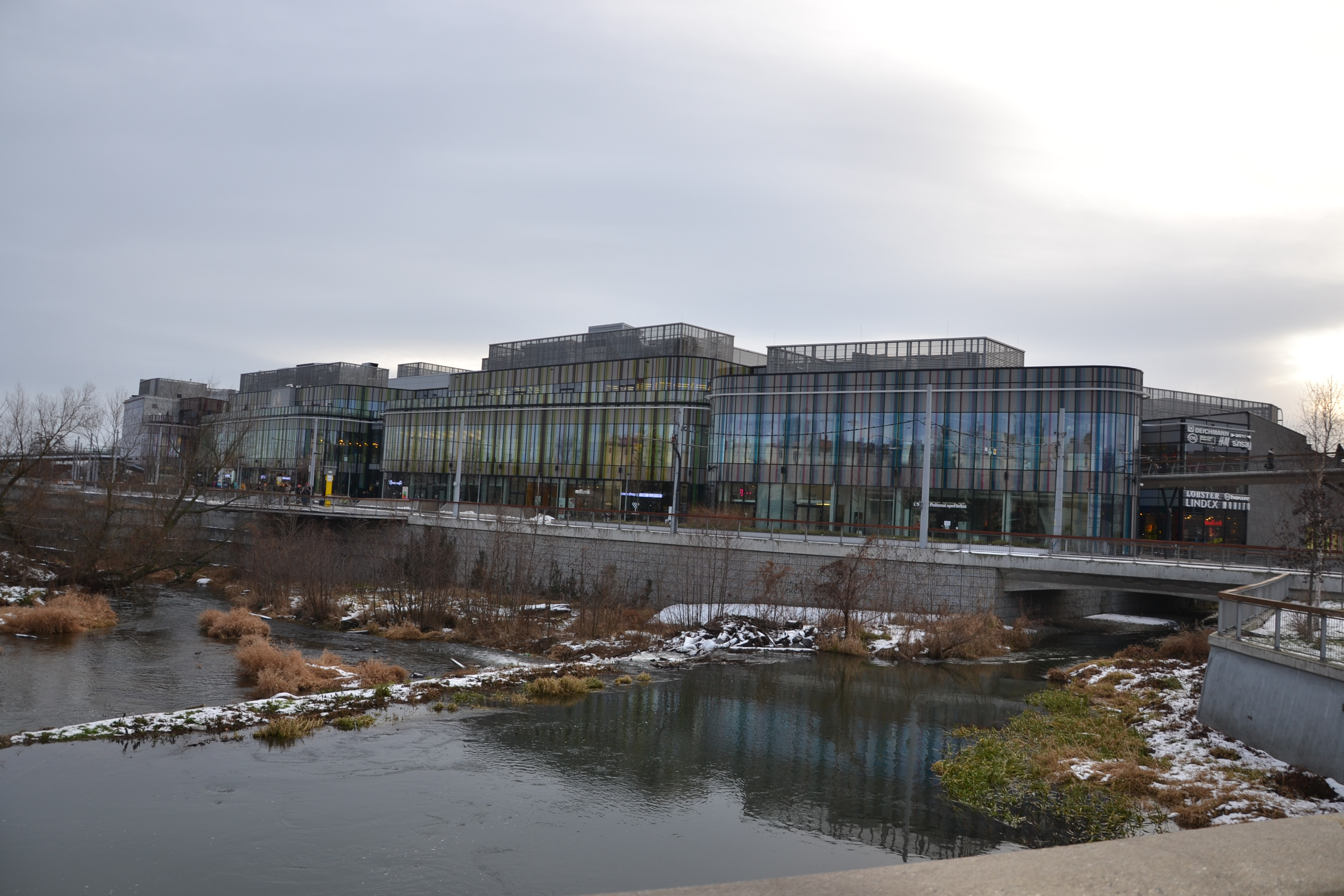 Galerie Šantovka focena přes Mlýnský potok v Olomouci